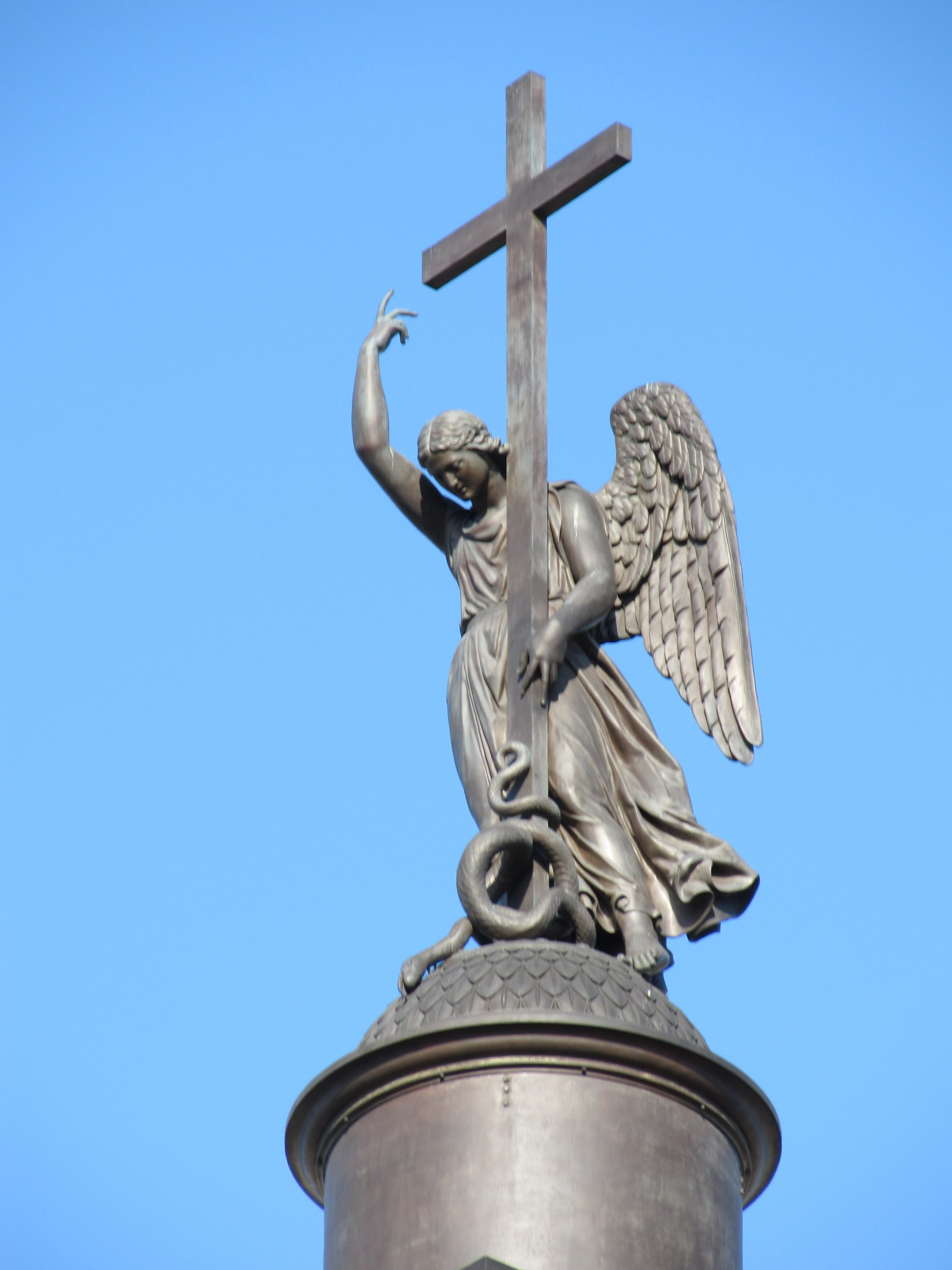 Александровская колонна, Санкт-Петербург